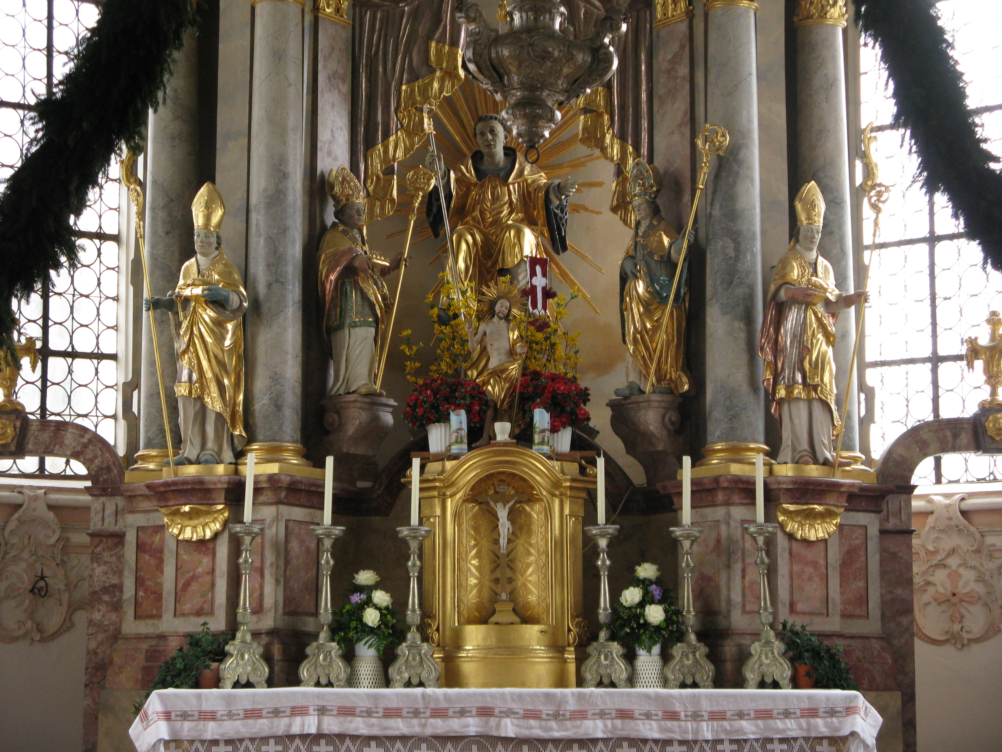 Rokkokoaltar, St. Leonhard. In der Mitte St. Leonhard (barock) links davon Hl. Nikolaus, rechts Hl. Augustinus. Außen: liHl. Benno, rechts Hl. Ulrich. Figuren: 2. Hälfte der 17. Jahrhunderts